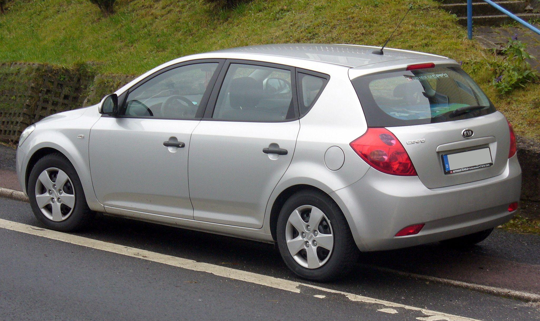 Kia cee'd LX